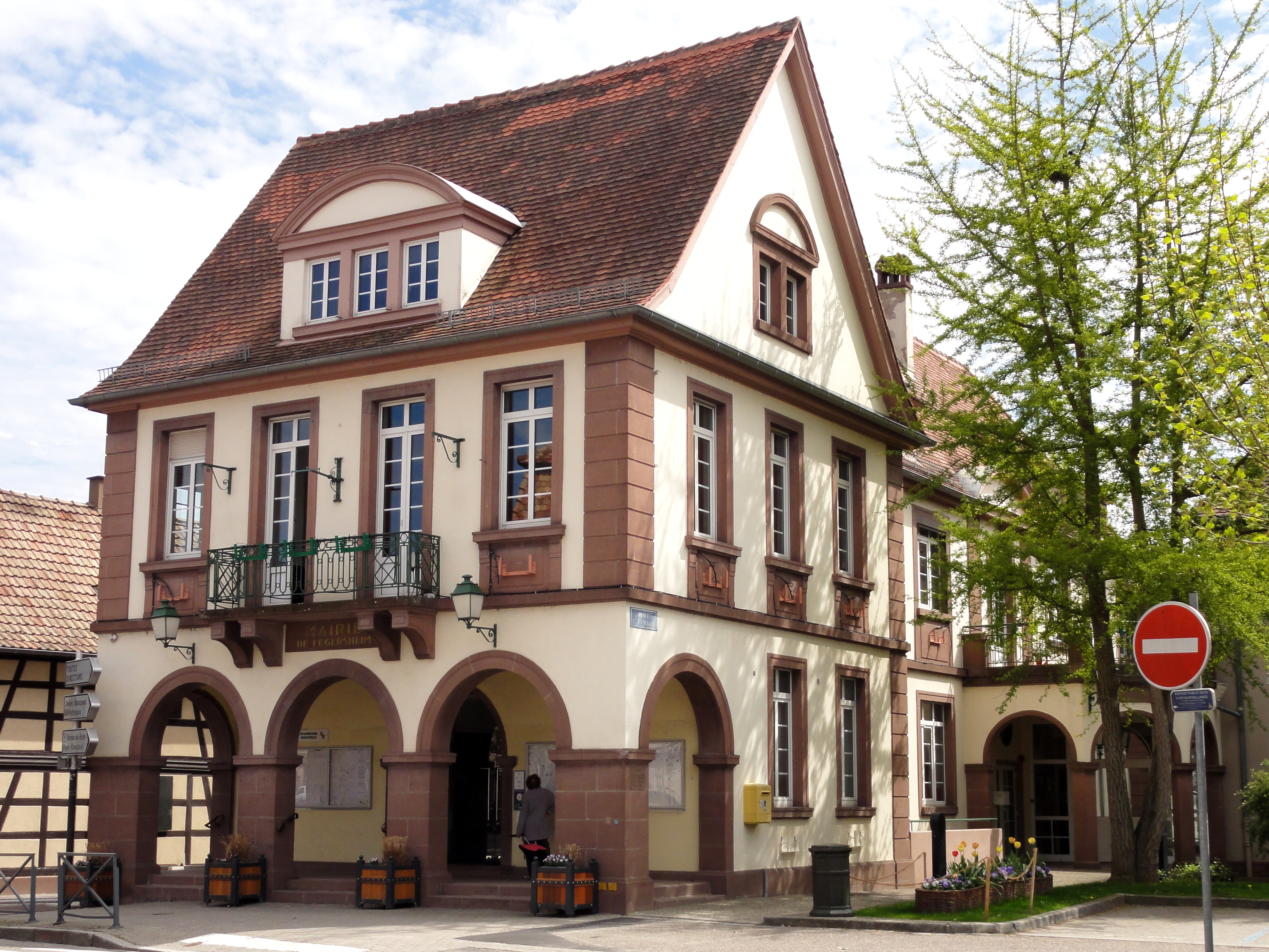 Alsace, Bas-Rhin, Fegersheim, Mairie.